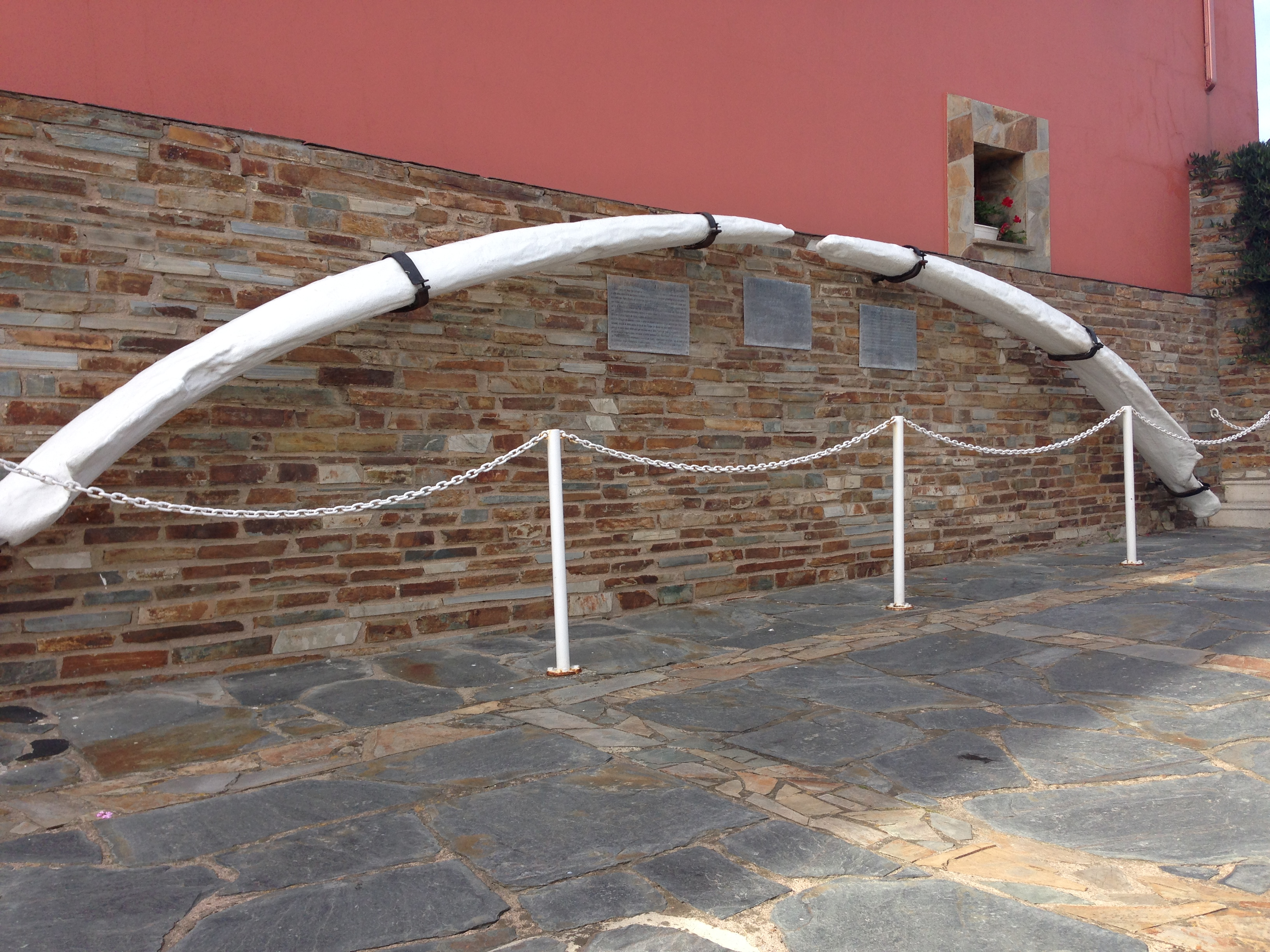 Puerto de Vega, Premio Príncipe de Asturias Pueblo Ejemplar en 1995